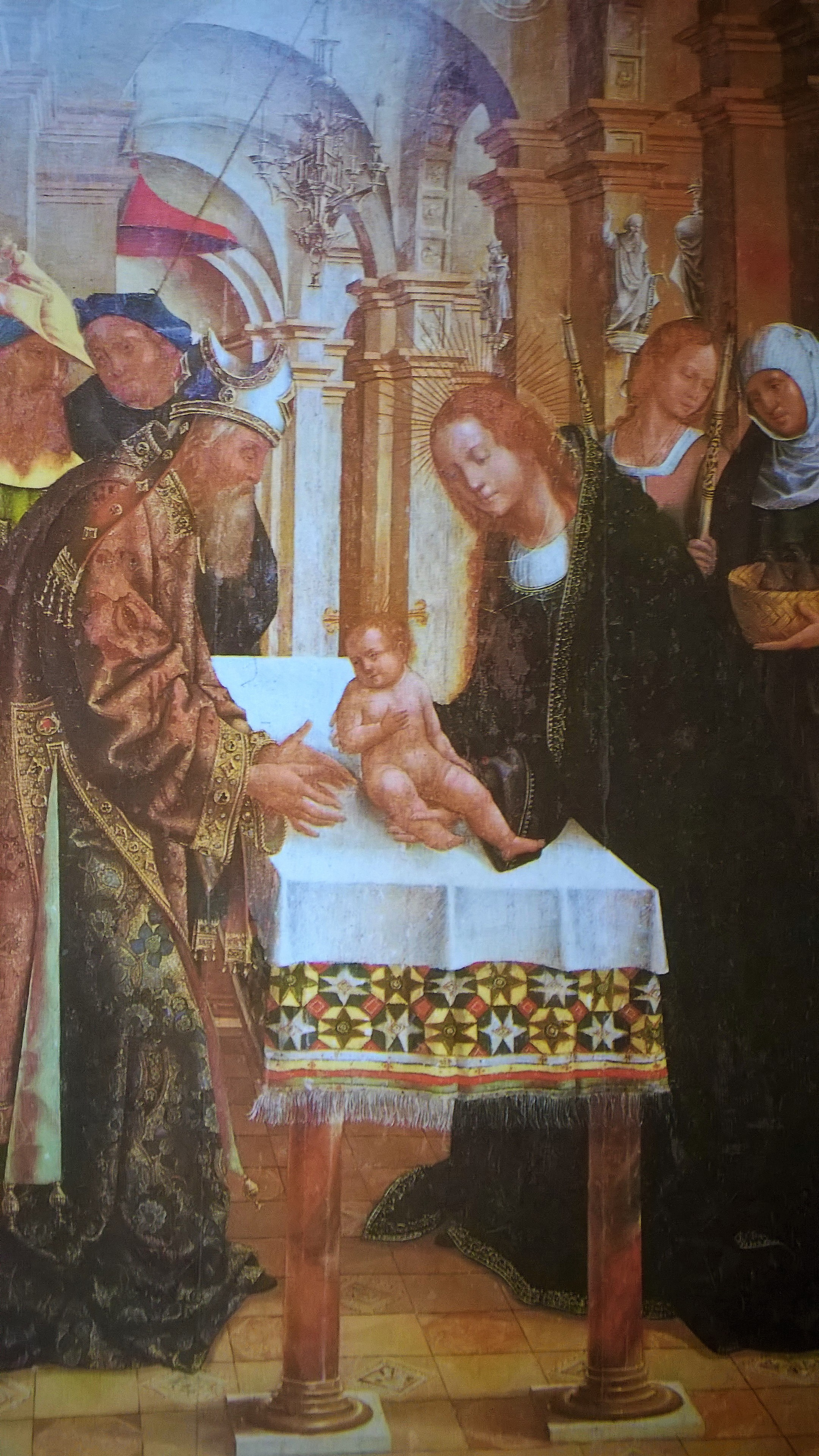 Apresentação de Jesus no templo (c. de 1503-1508), de Francisco Henriques, na Casa dos Patudos, em Alpiarça.